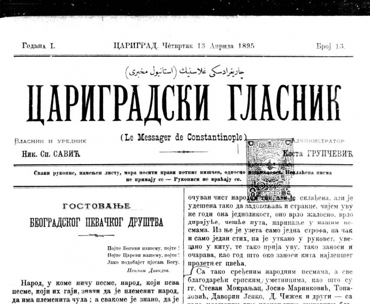 Главата на вестник "Цариградски гласник".